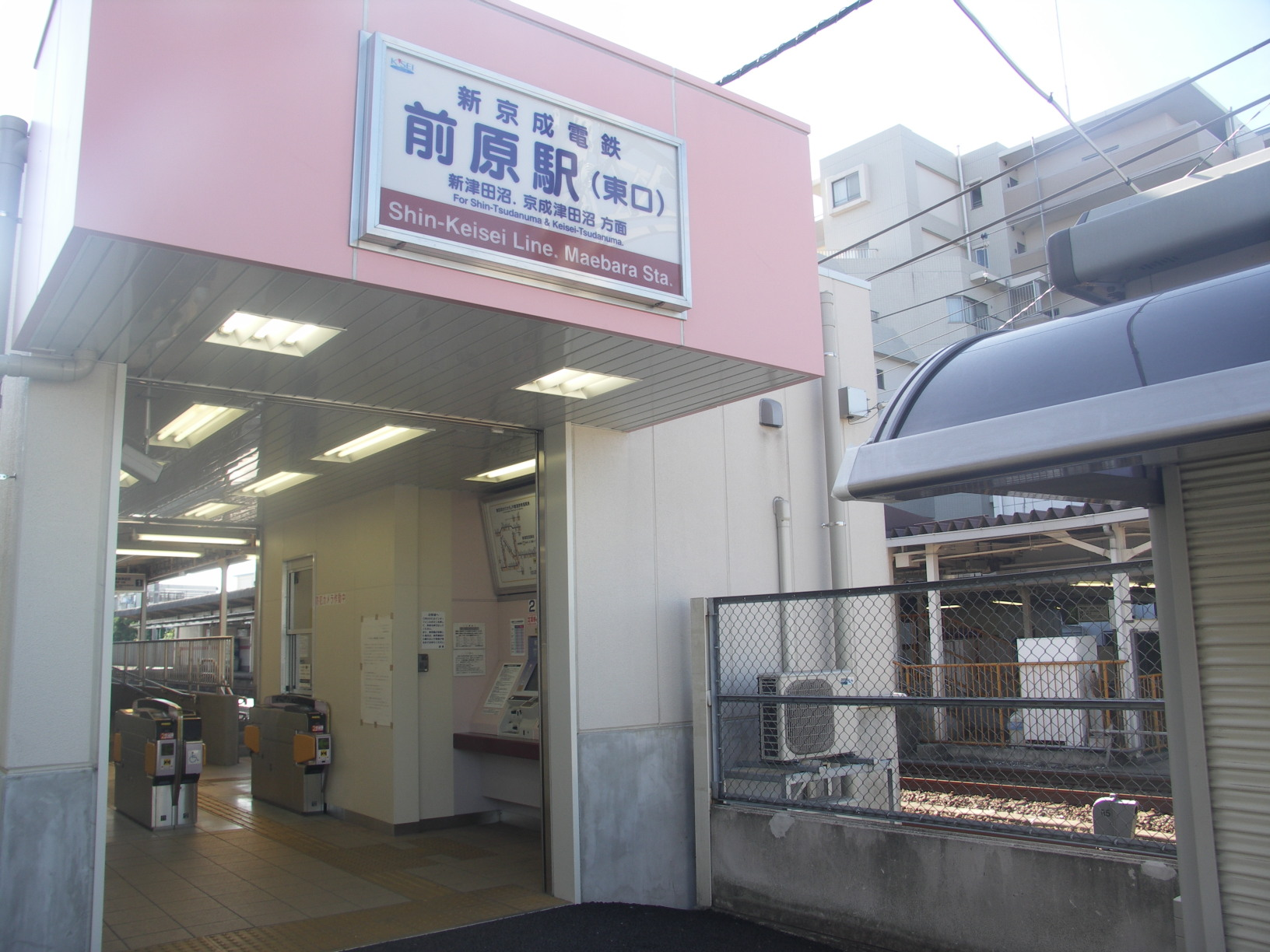 Maebara station east, Shin-Keisei Line, Chiba, Japan, 前原駅東口